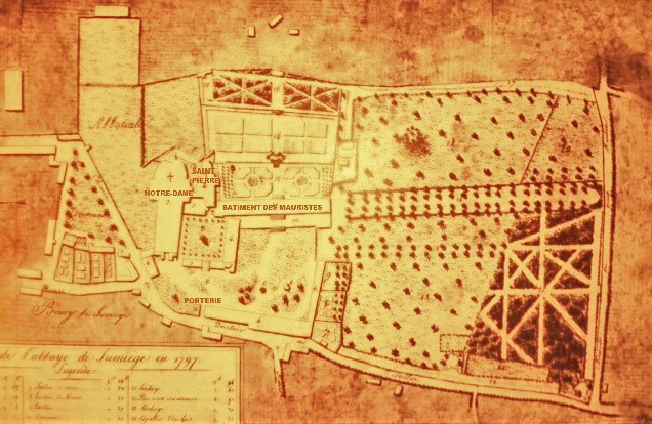 Abbaye de Jumièges, plan de 1797 (image du domaine public modifiée)